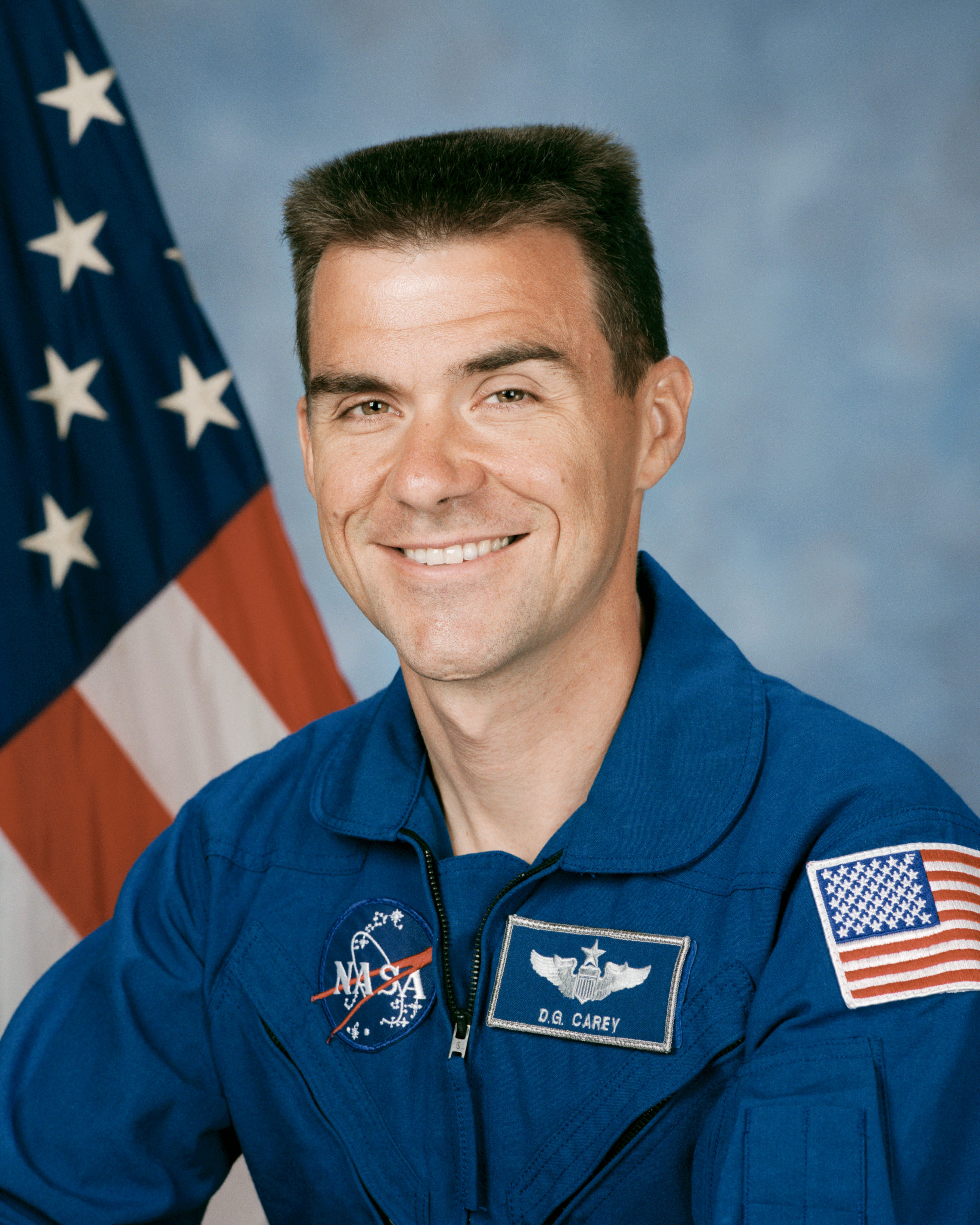 portrait astronaut Duane Carey